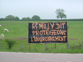 Protest tegen de vuilkuil, Rémilly (Nièvre), Frankrijk